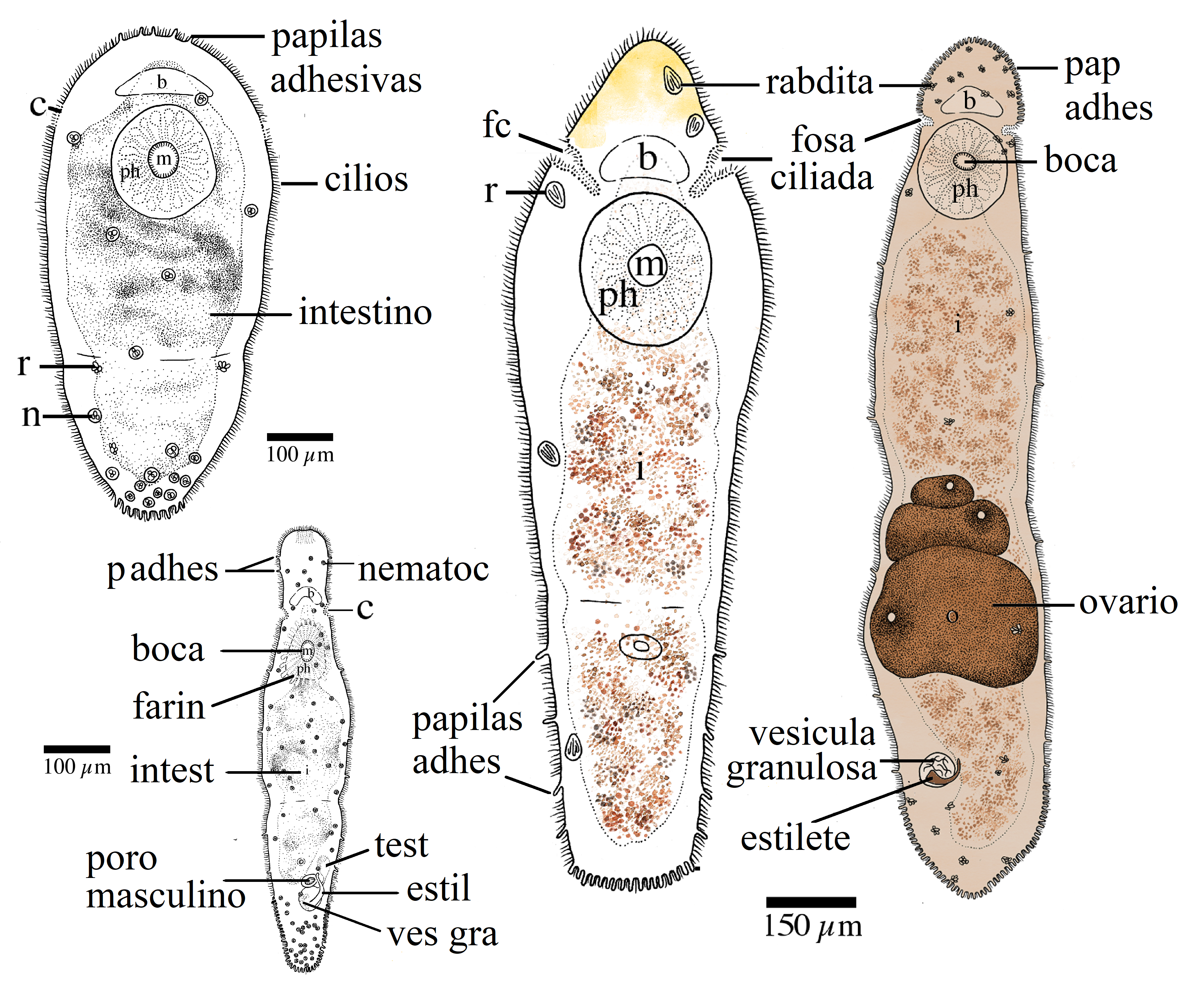 Microstomidae. Especies de Microstomum.